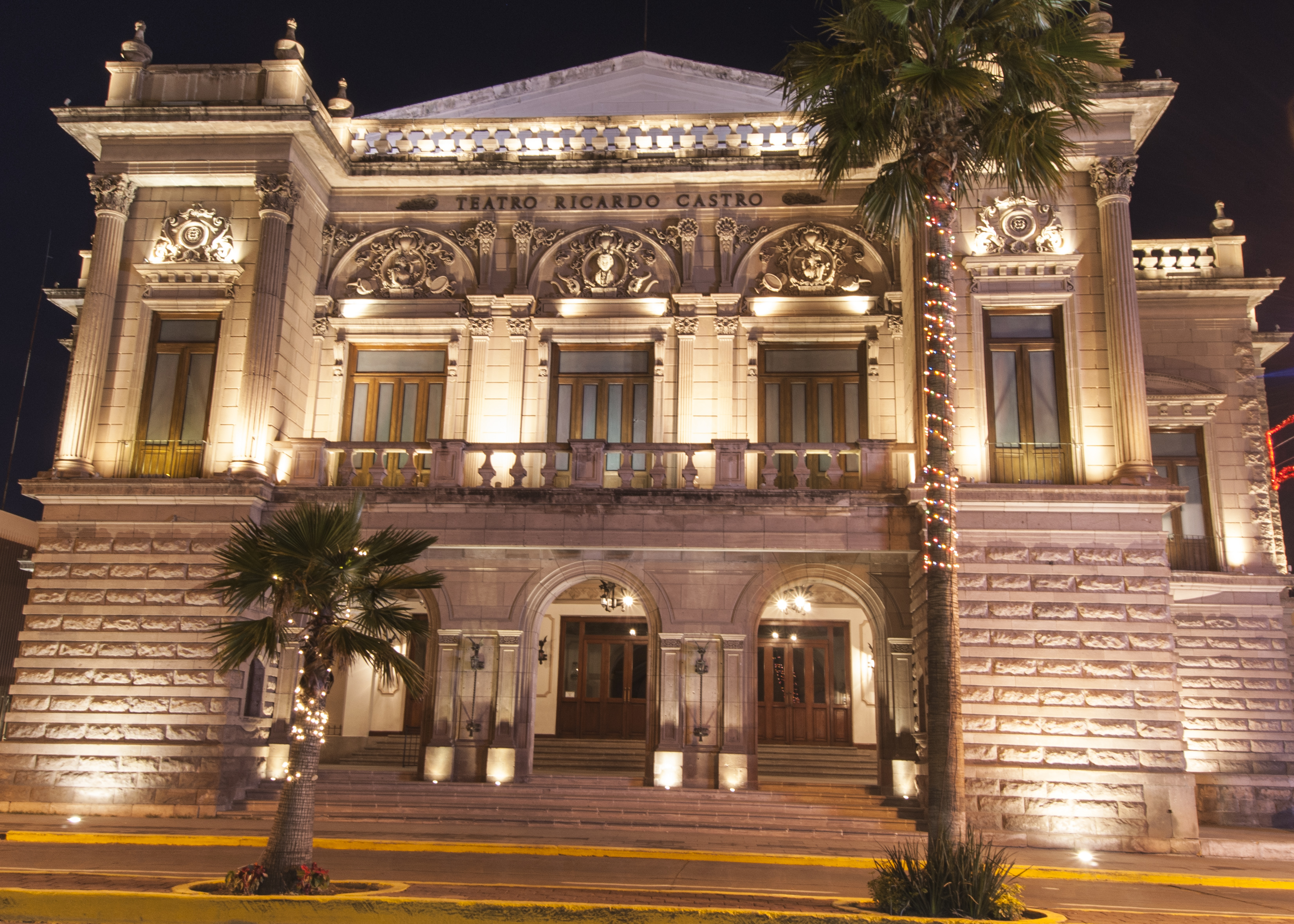 Vista Nocturna del Teatro Castro, importante monumento histórico en el centro de la ciudad de Durango.